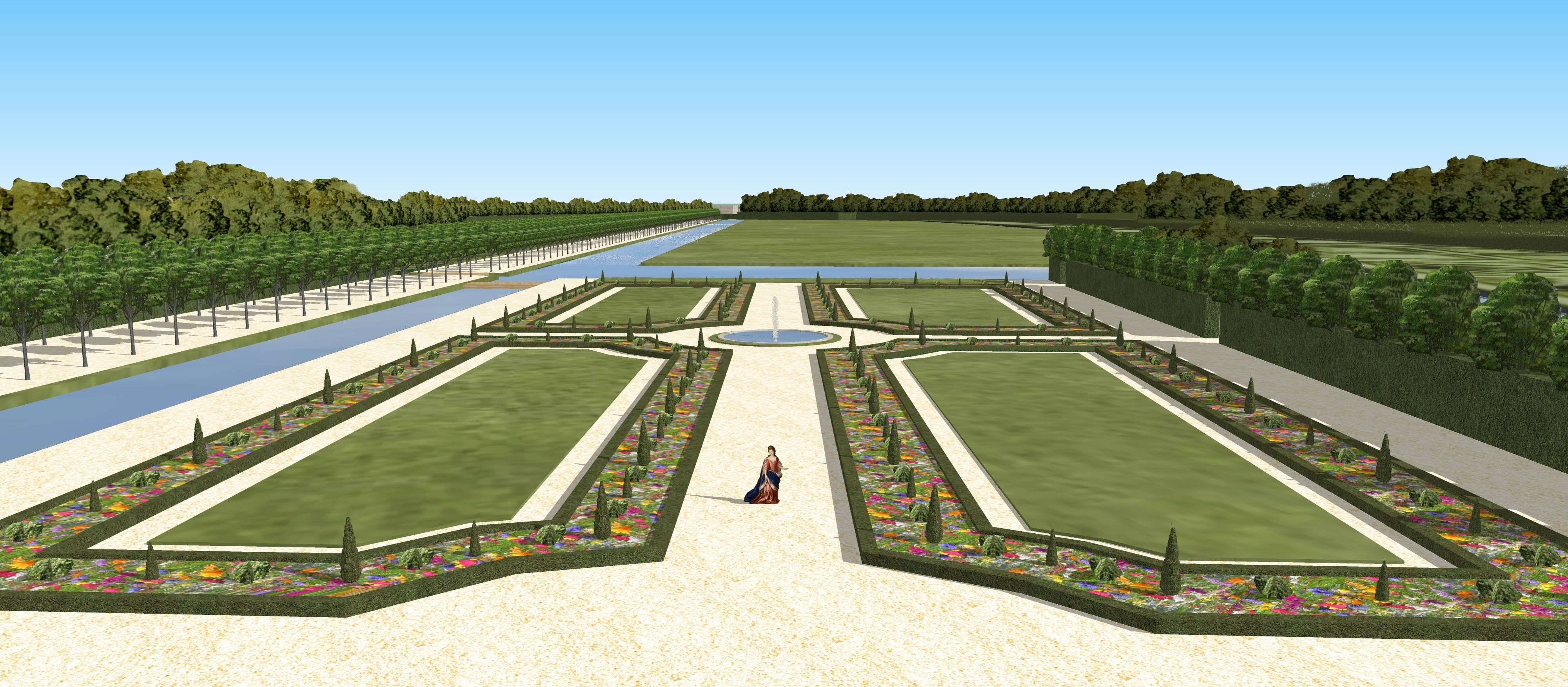 Cachan jardins à la francaise